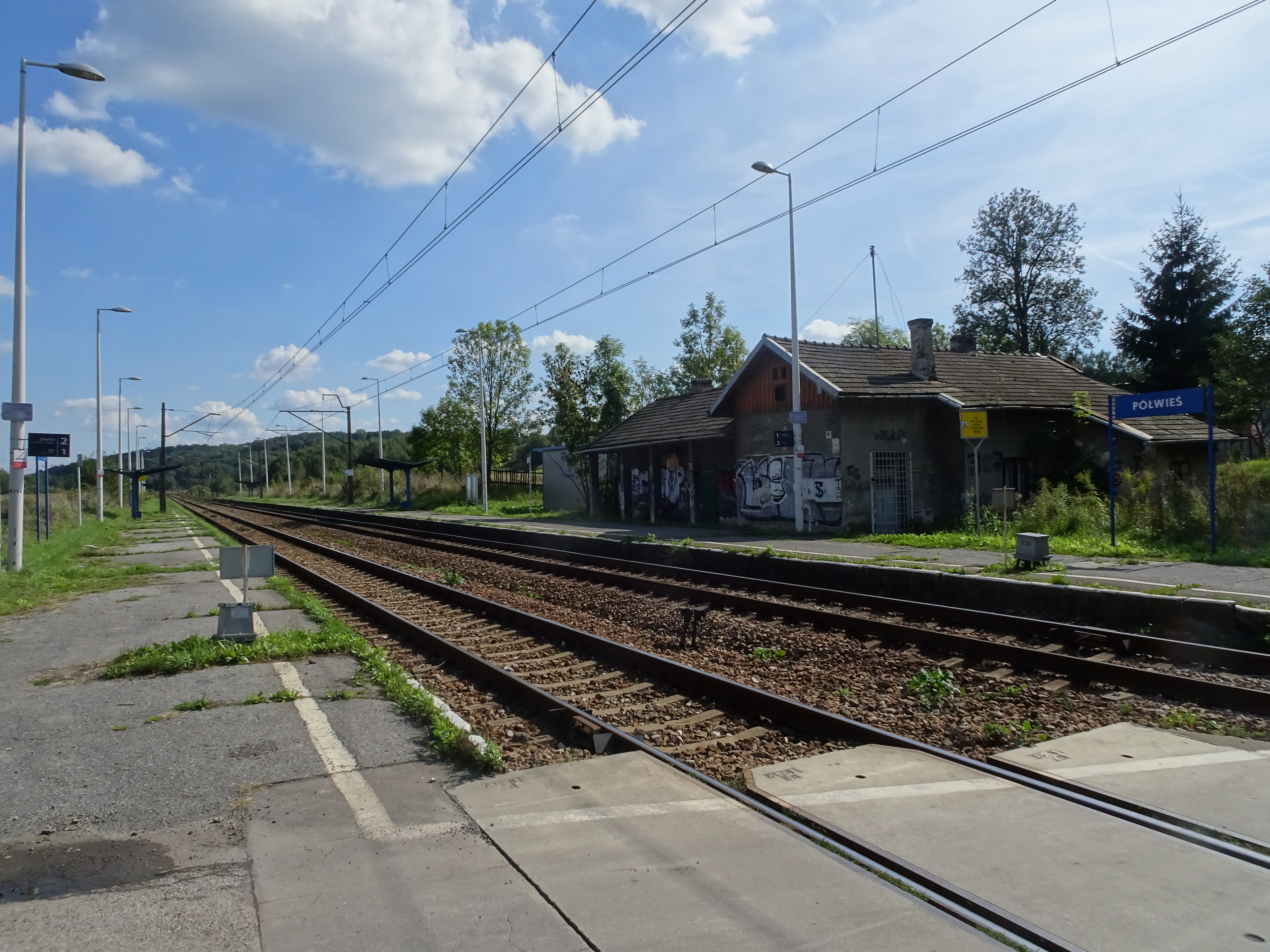 Przystanek kolejowy Półwieś (2018)